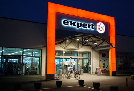 expert Fachmarkt Außenaufnahme